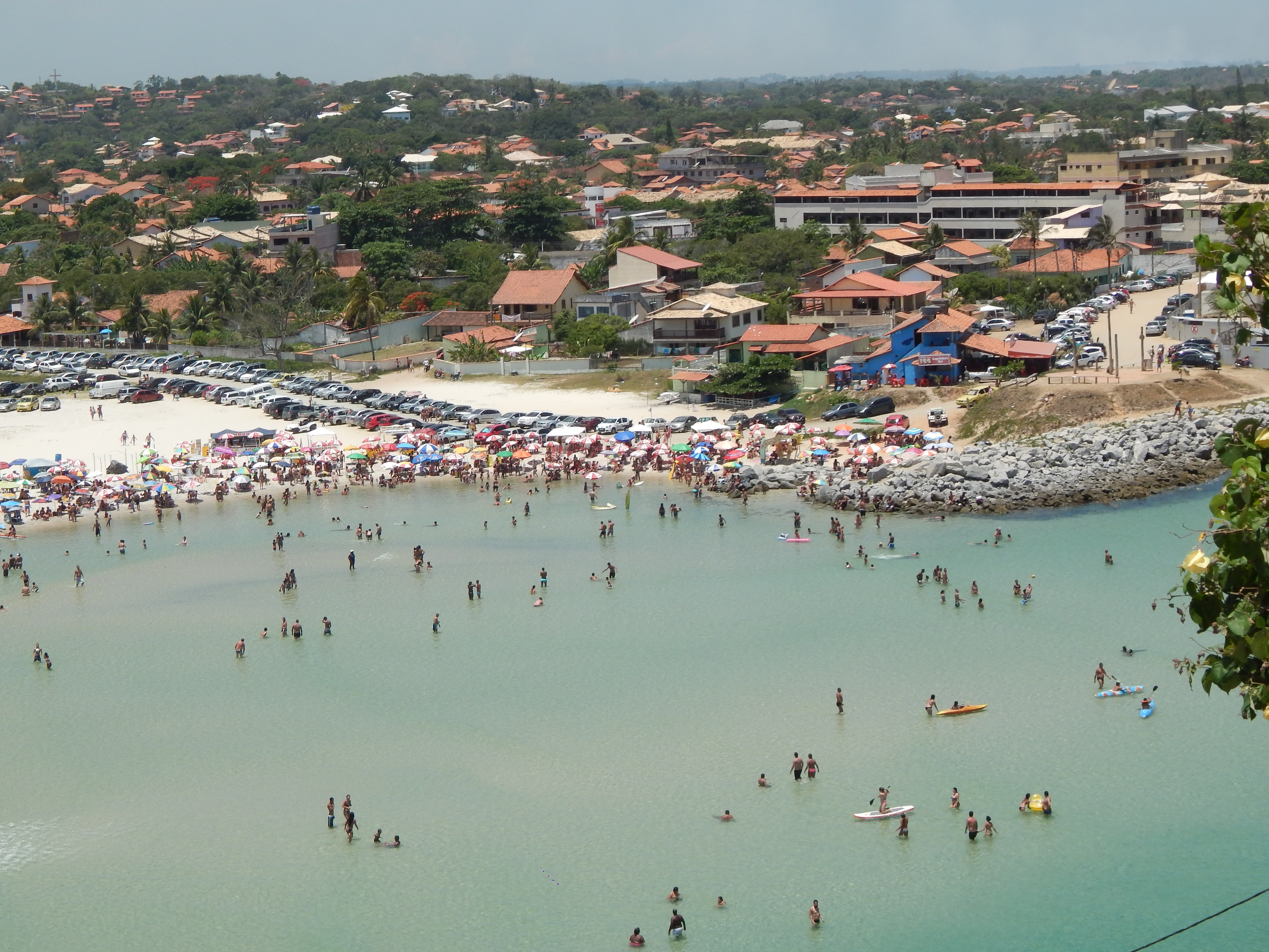 FOTO TIRADA EM 31/12/14 EM SAQUAREMA - RIO DE JANEIRO - BRASIL